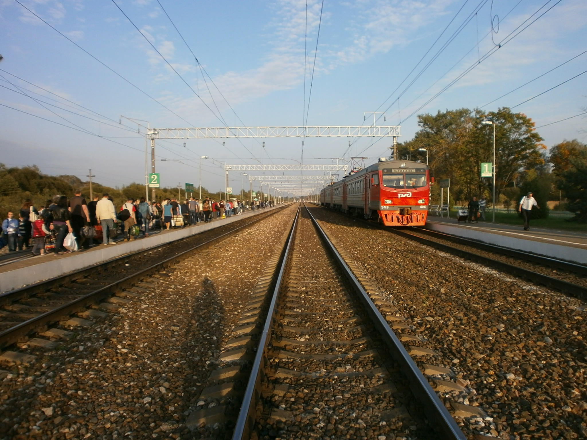 Пассажирские платформы станции Красное. Вдали - электропоезд ЭМ9-006